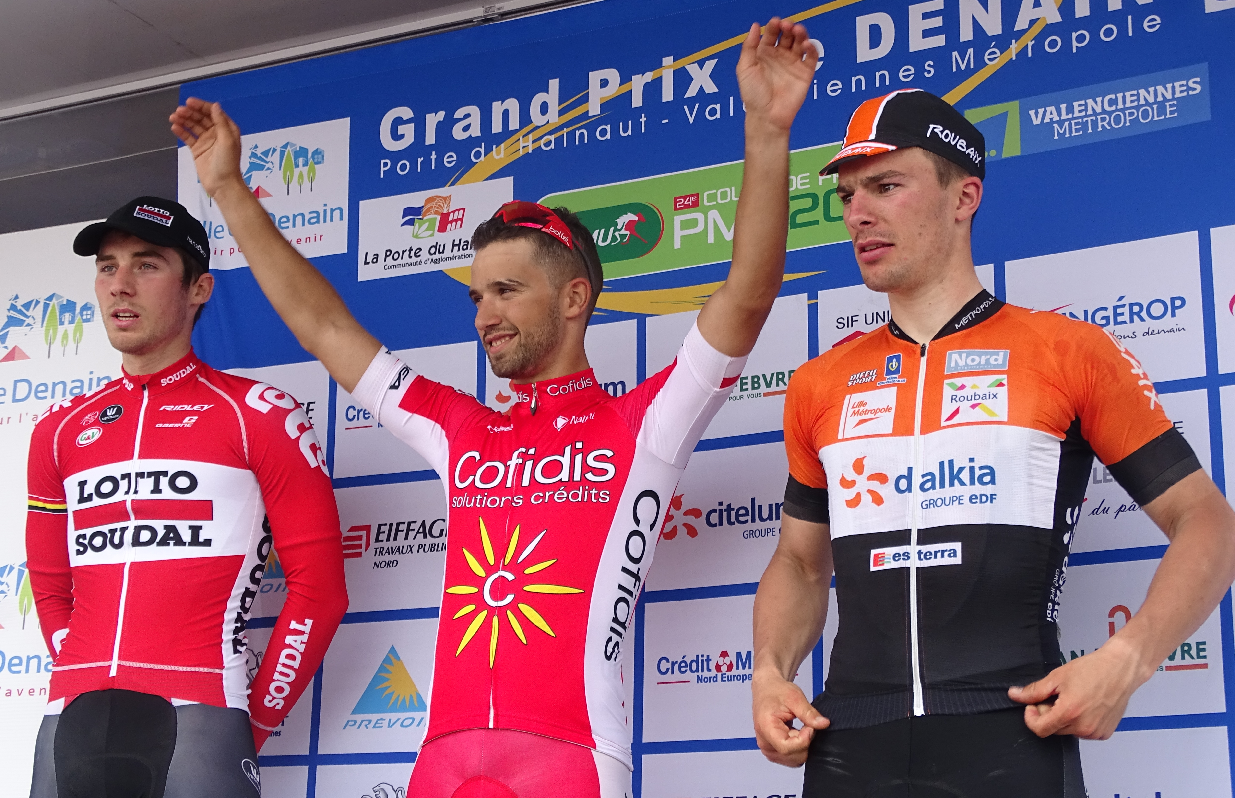 Reportage réalisé le jeudi 16 avril à l'occasion du départ et de l'arrivée du Grand Prix de Denain 2015 à Denain, Nord, Nord-Pas-de-Calais, France.